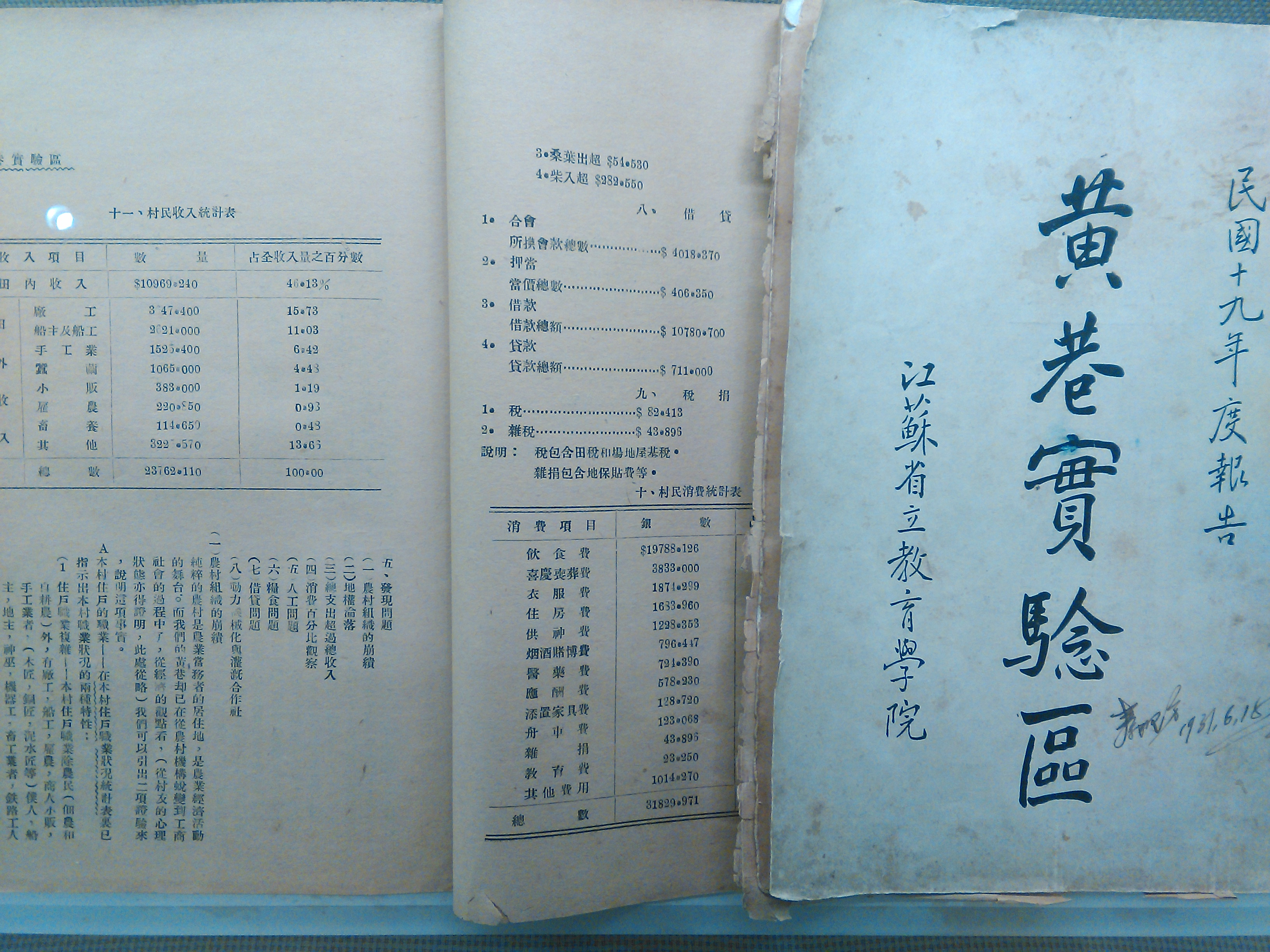 陈翰笙等进行农村经济调查时所用调查表及调查基础上行成的著作